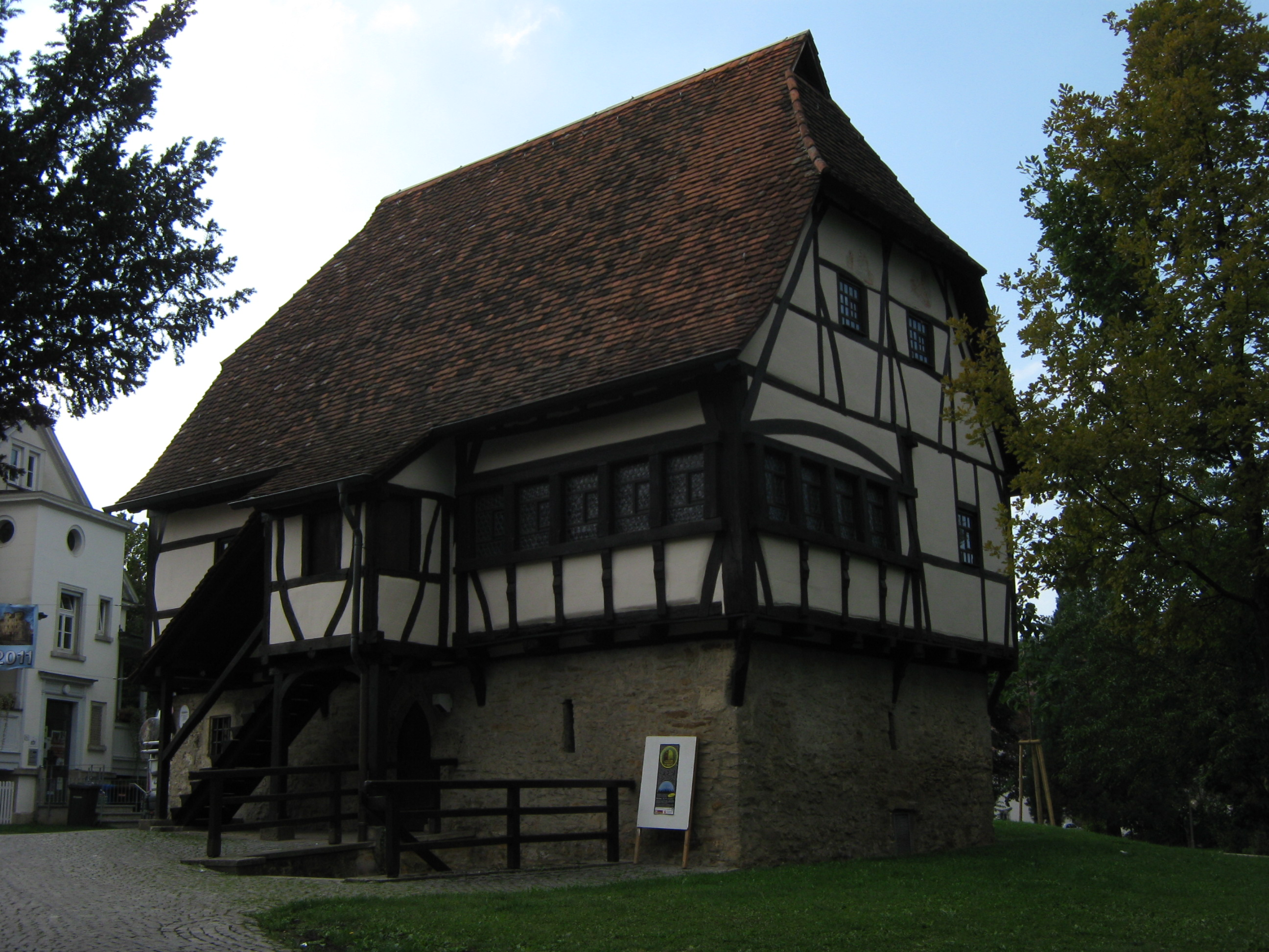 Das Schlößle in Pfullingen, Griessstraße 24/1, ist ein alemannischer Fachwerkbau auf steinernem Erdgeschoß von 1450. Das Gebäude wurde 1979 restauriert und wird als stadtgeschichtliches Museum genutzt